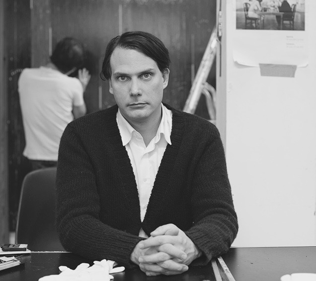 Foto: Luise Müller-Hofstede